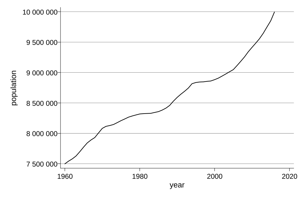 Variant av File:2017 Sweden population 1960-2016-en.svg.